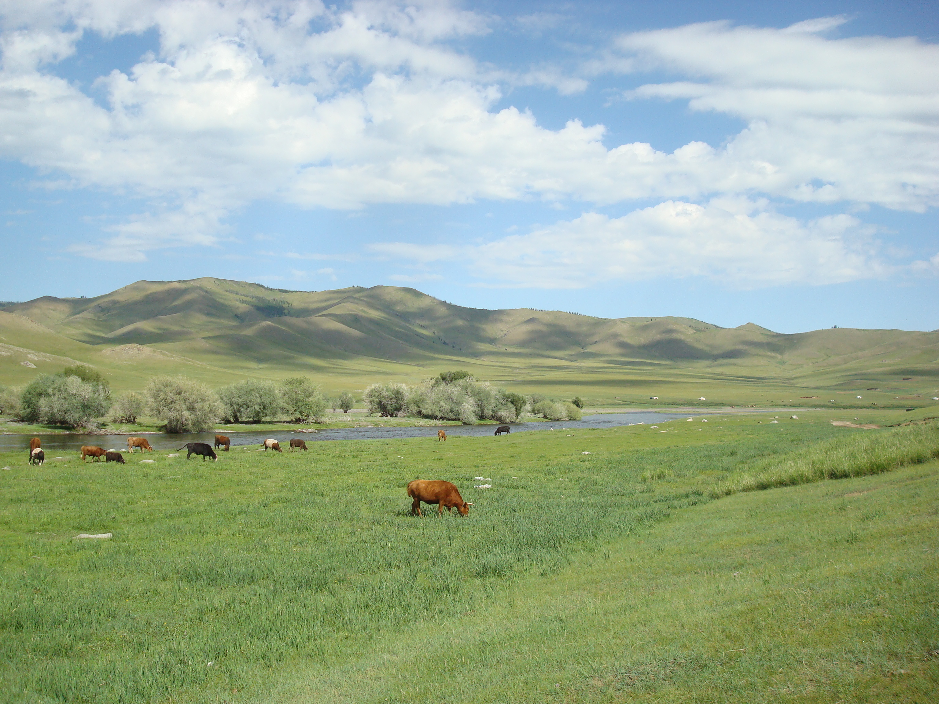 Am Orchon